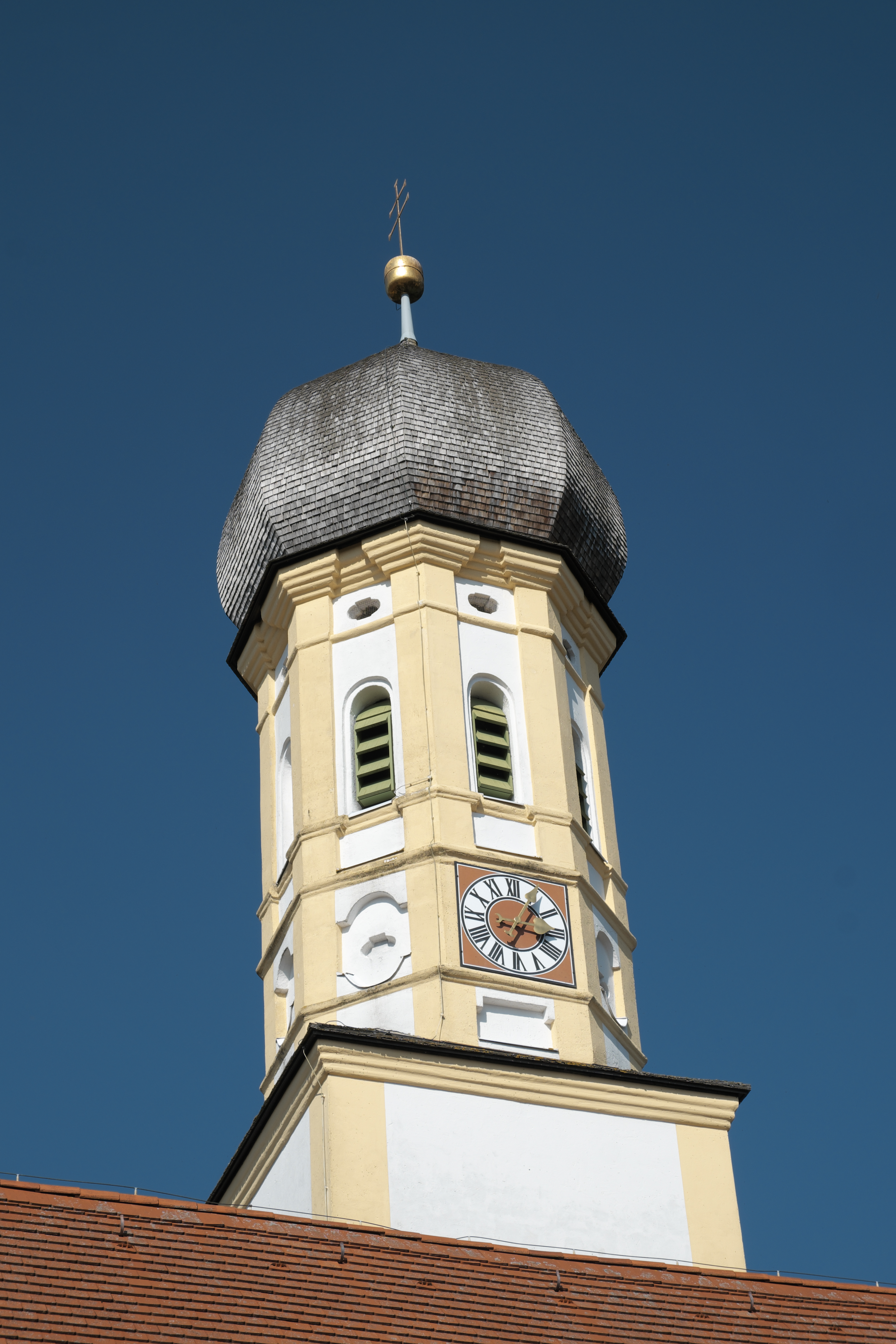 Katholische Filialkirche St. Georg in Pfaffenhofen, einem Ortsteil von Jesenwang im Landkreis Fürstenfeldbruck (Bayern/Deutschland), Glockenturm